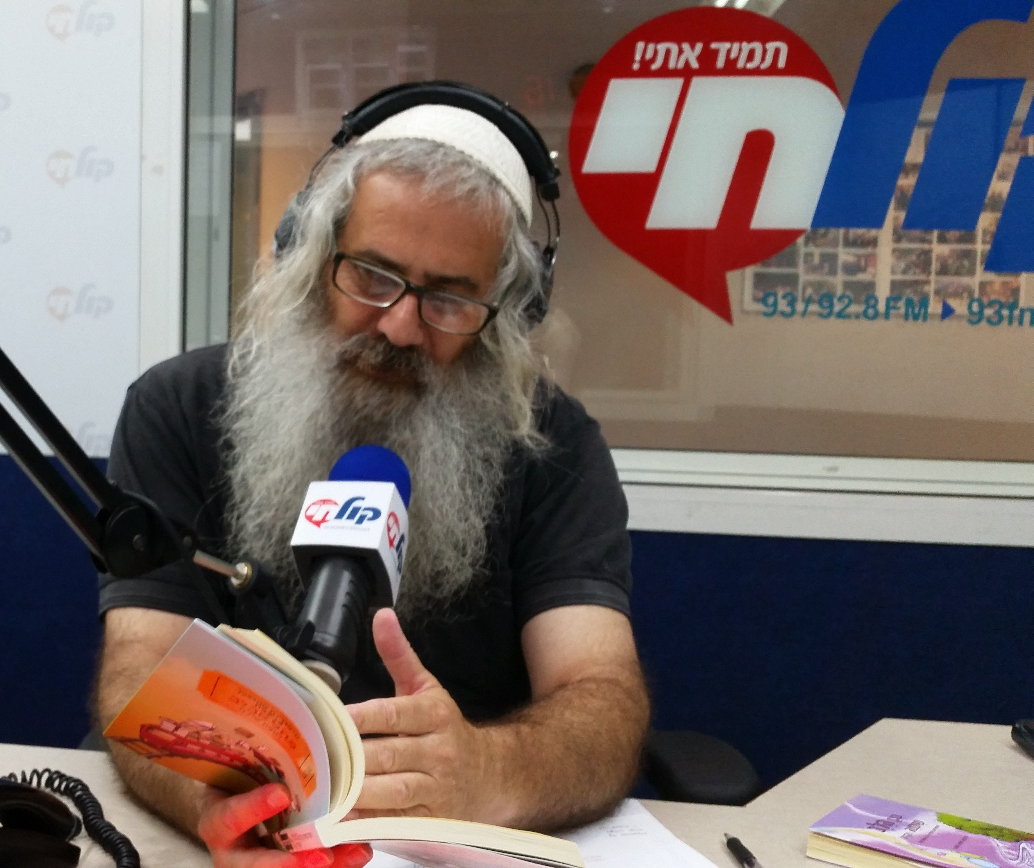 שלומי שטרן ברדיו קול חי